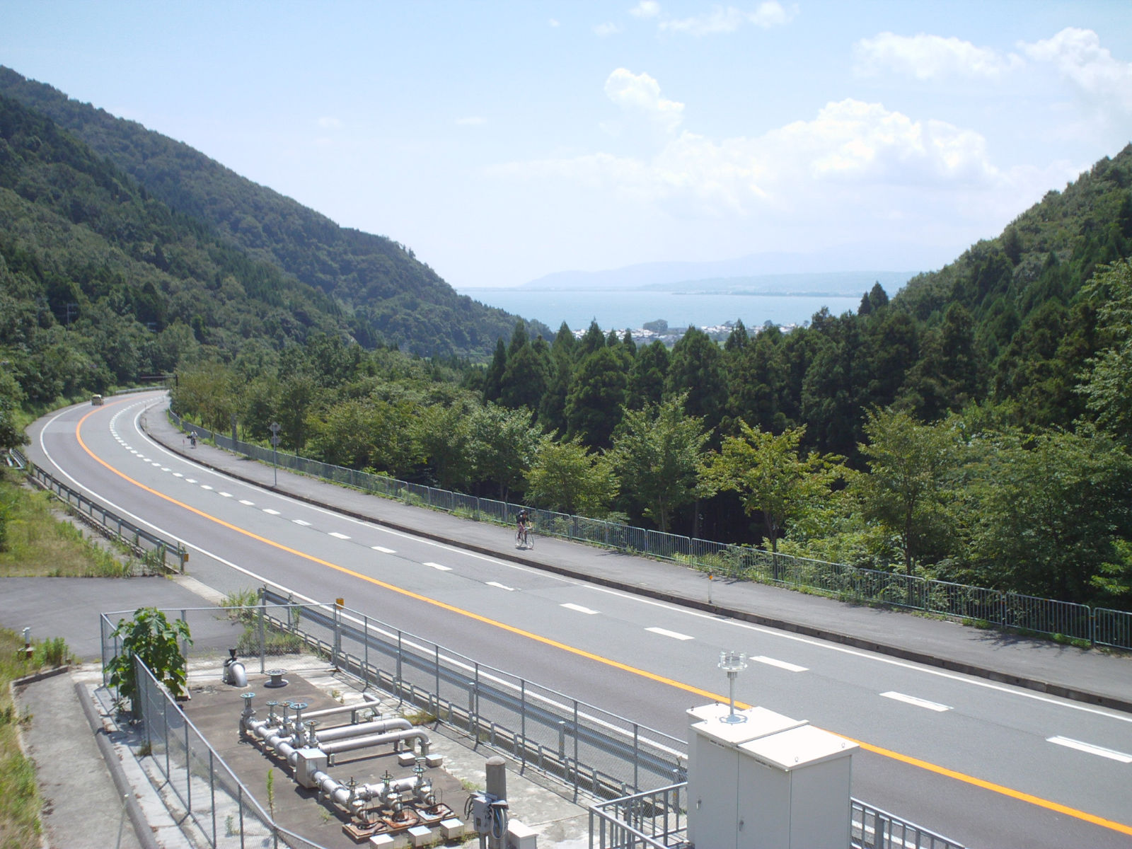 国道161号、追坂峠